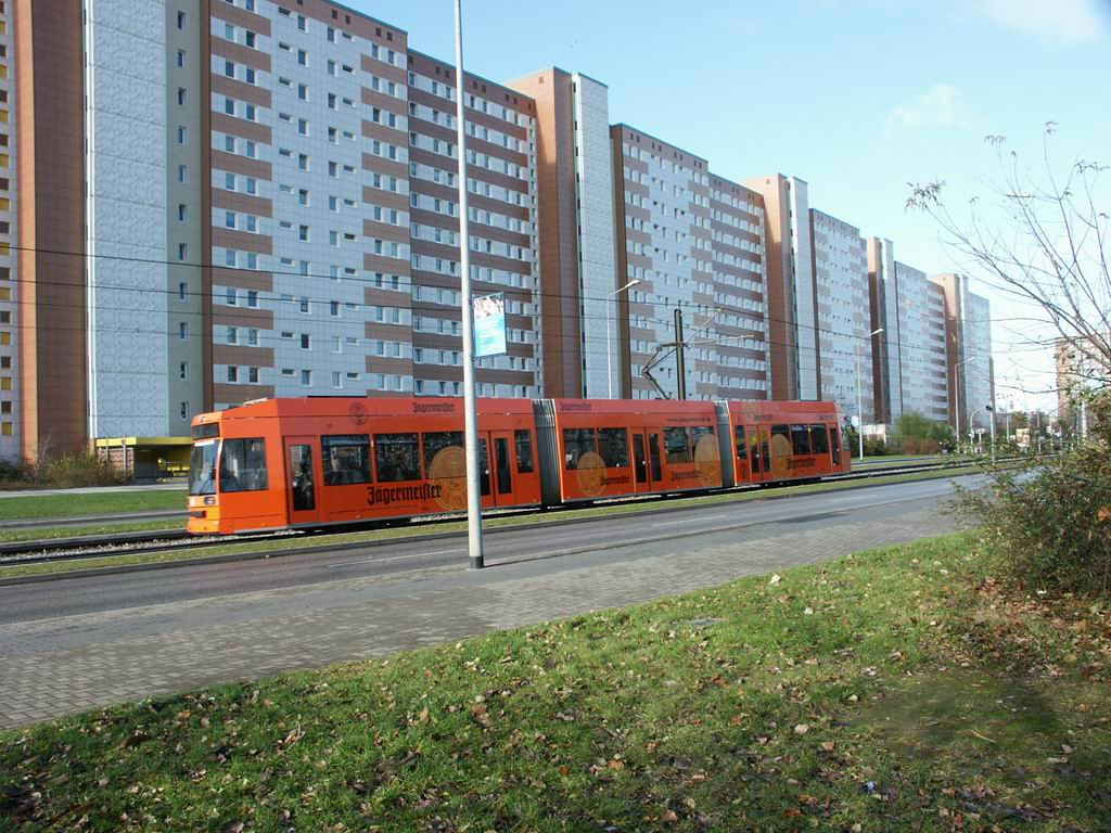 Neubaugebiet in Rostock (Evershagen) in verschiedenen Perspektiven eines Rundganges aus dem Jahre 2003 im zum größten Teil modernisiertem Zustand.